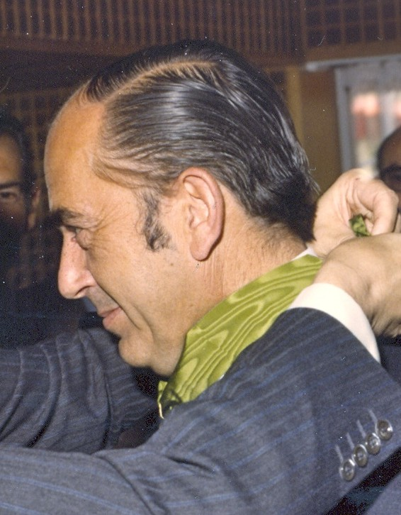 Manuel Beteta Ortiz recibiendo la Encomienda del Mérito Agrícola (hacia 1975)